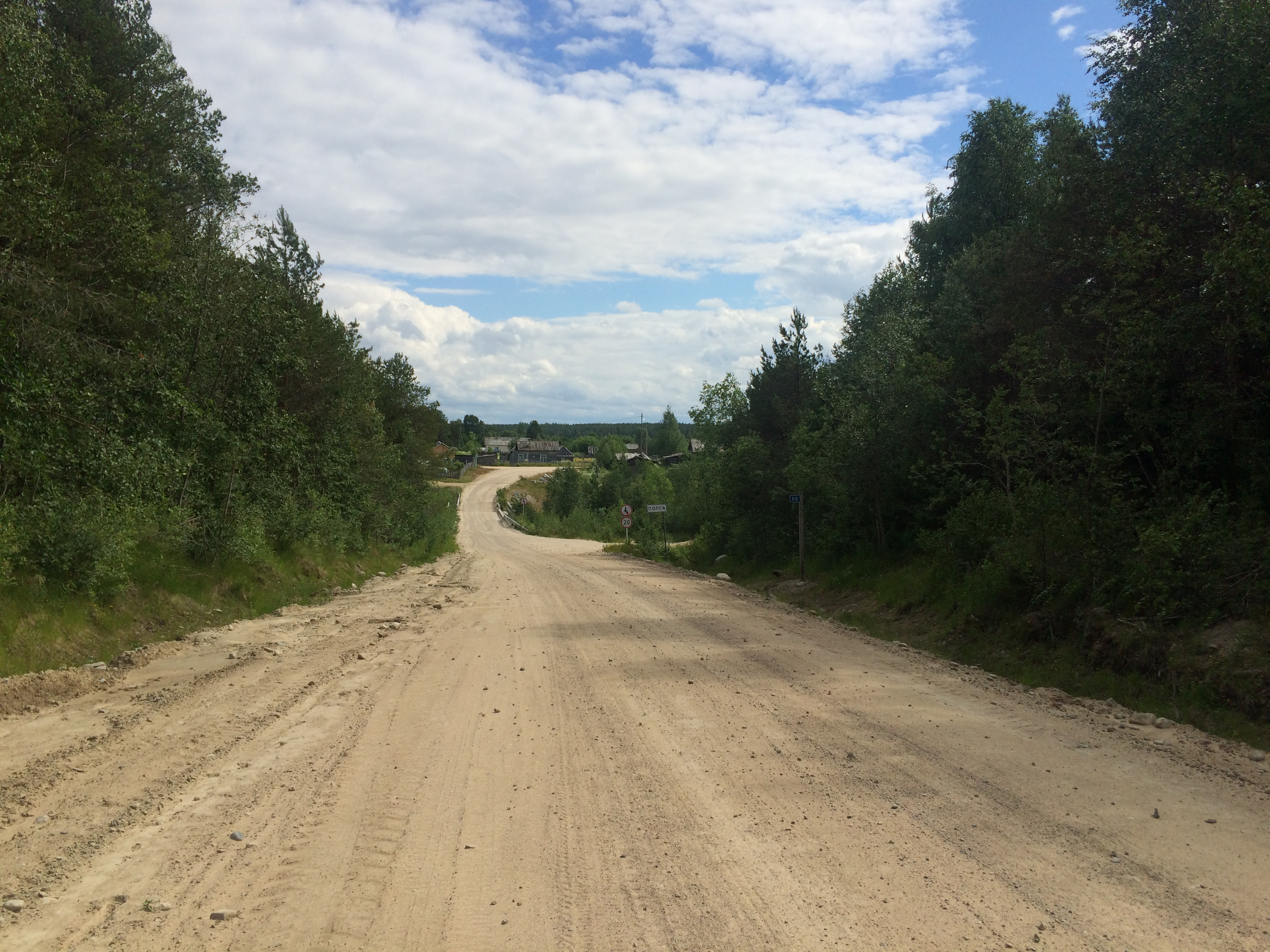 Полга